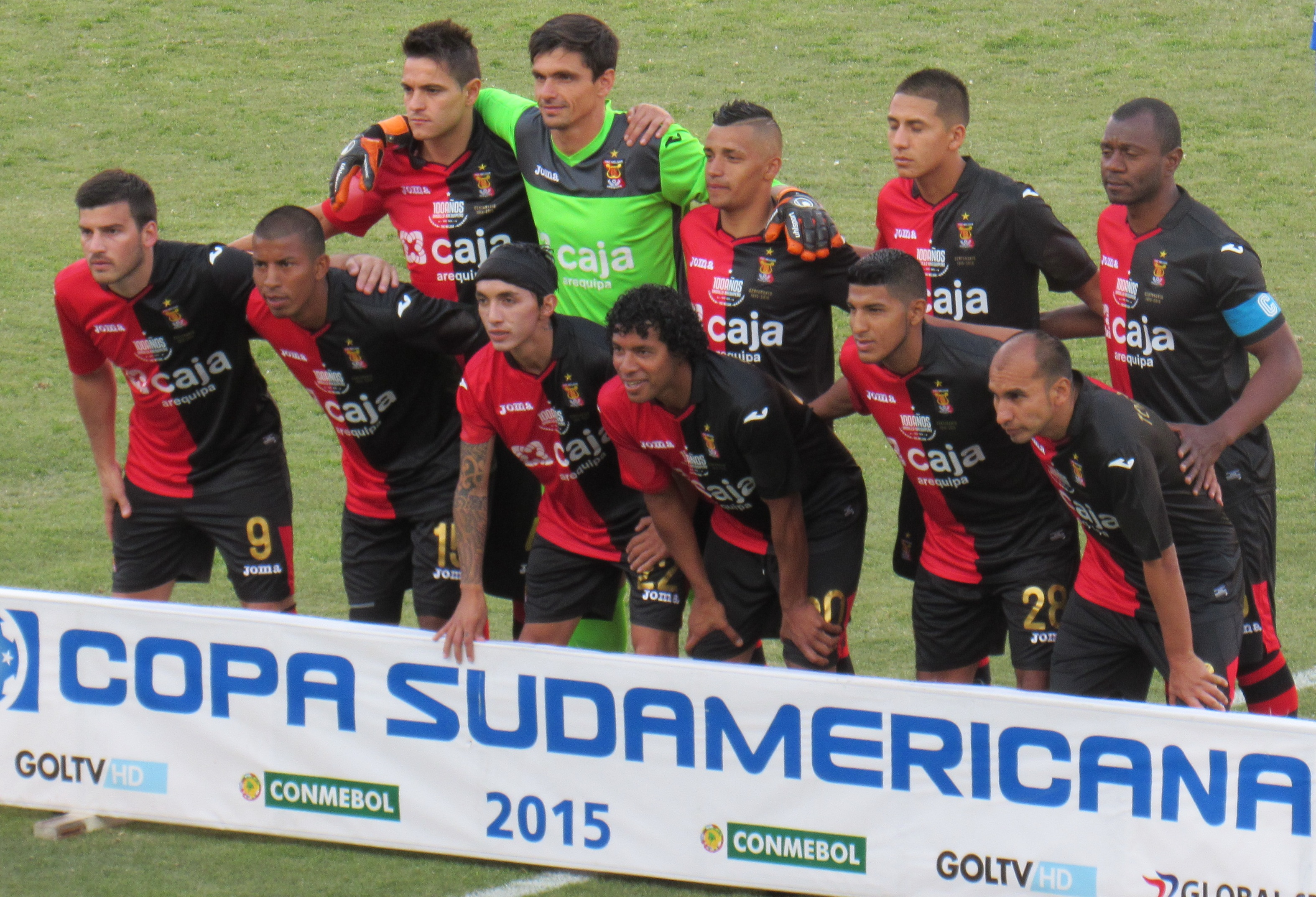 FBC Melgar 2015. Campeón Nacional del Futbol Peruano.